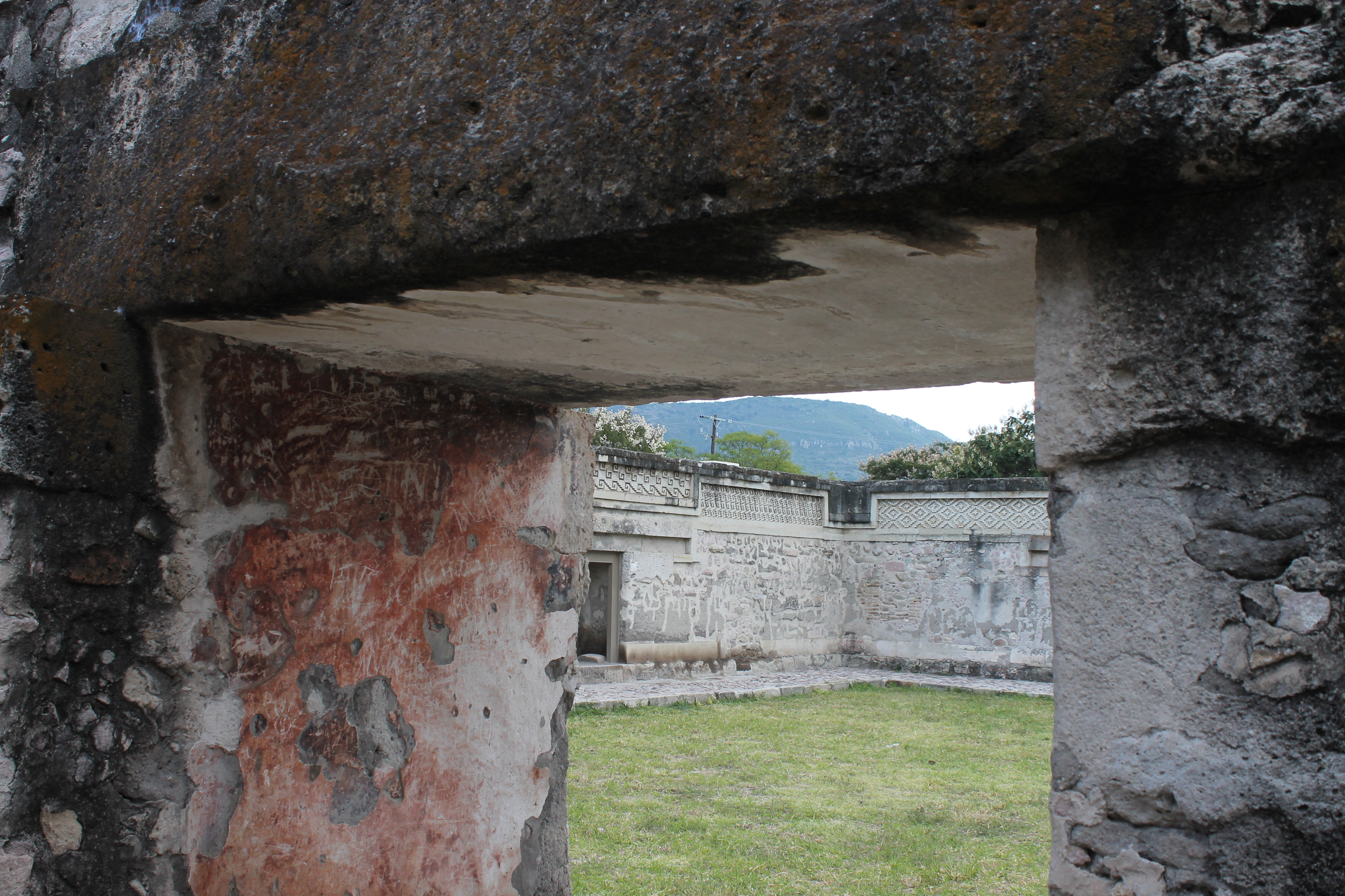 Se muestra en primer plano el marco de uno de los accesos a un patio del Grupo Norte. En la parte izquierda del marco se divisa una sección pigmentada con rojo, los muros estaban cubiertos con ese pigmento anteriormente.Seguido del marco se aprecia el patio que da acceso y al fondo se divisan muros exteriores.